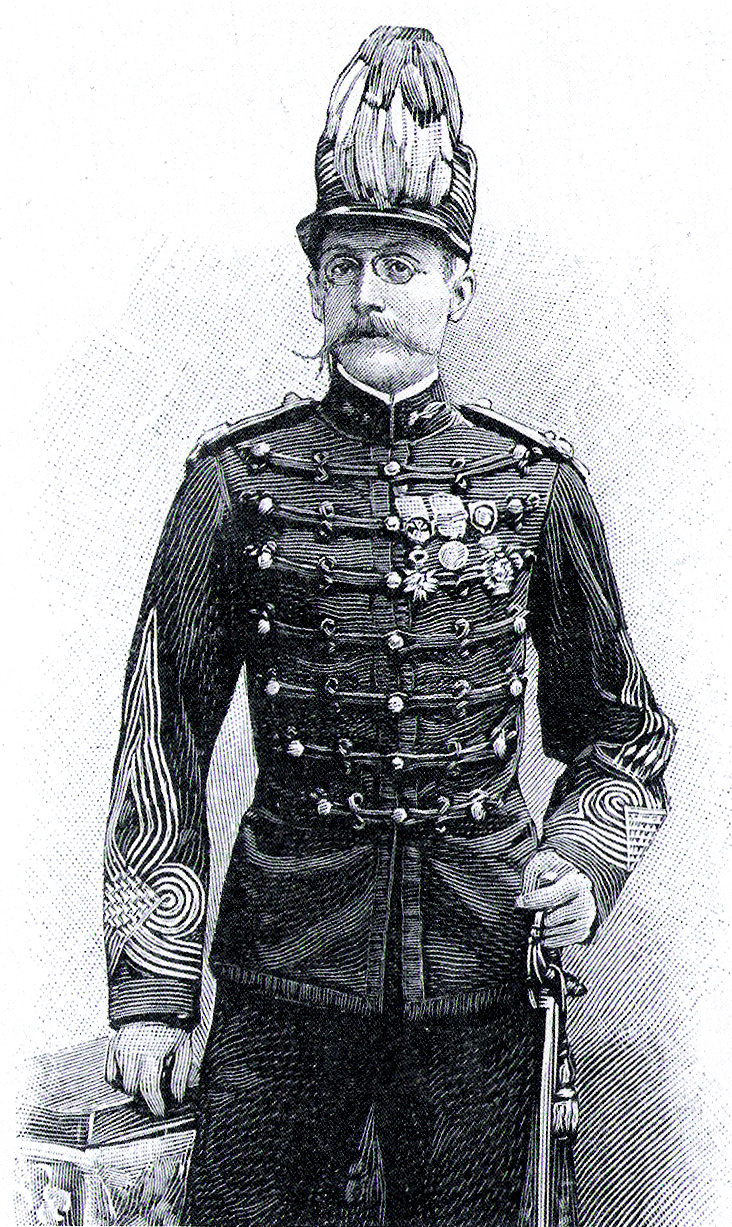 Portrait du lieutenant-colonel Klobb.